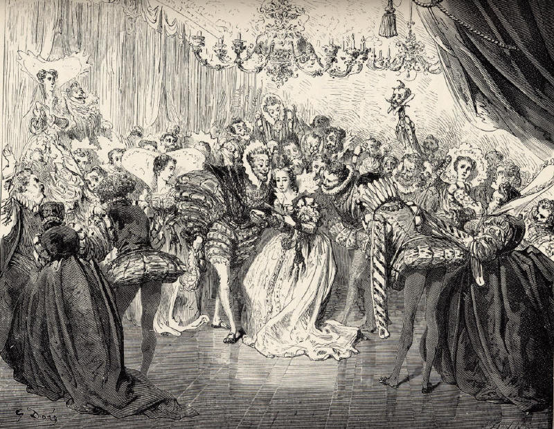 Illustration for Charles Perrault's Cinderella from Histoires ou Contes du Temps passé: Les Contes de ma Mère l'Oye(1697). Gustave Doré's illustrations appear in an 1867 edition entitled Les Contes de Perrault. Second of three engravings